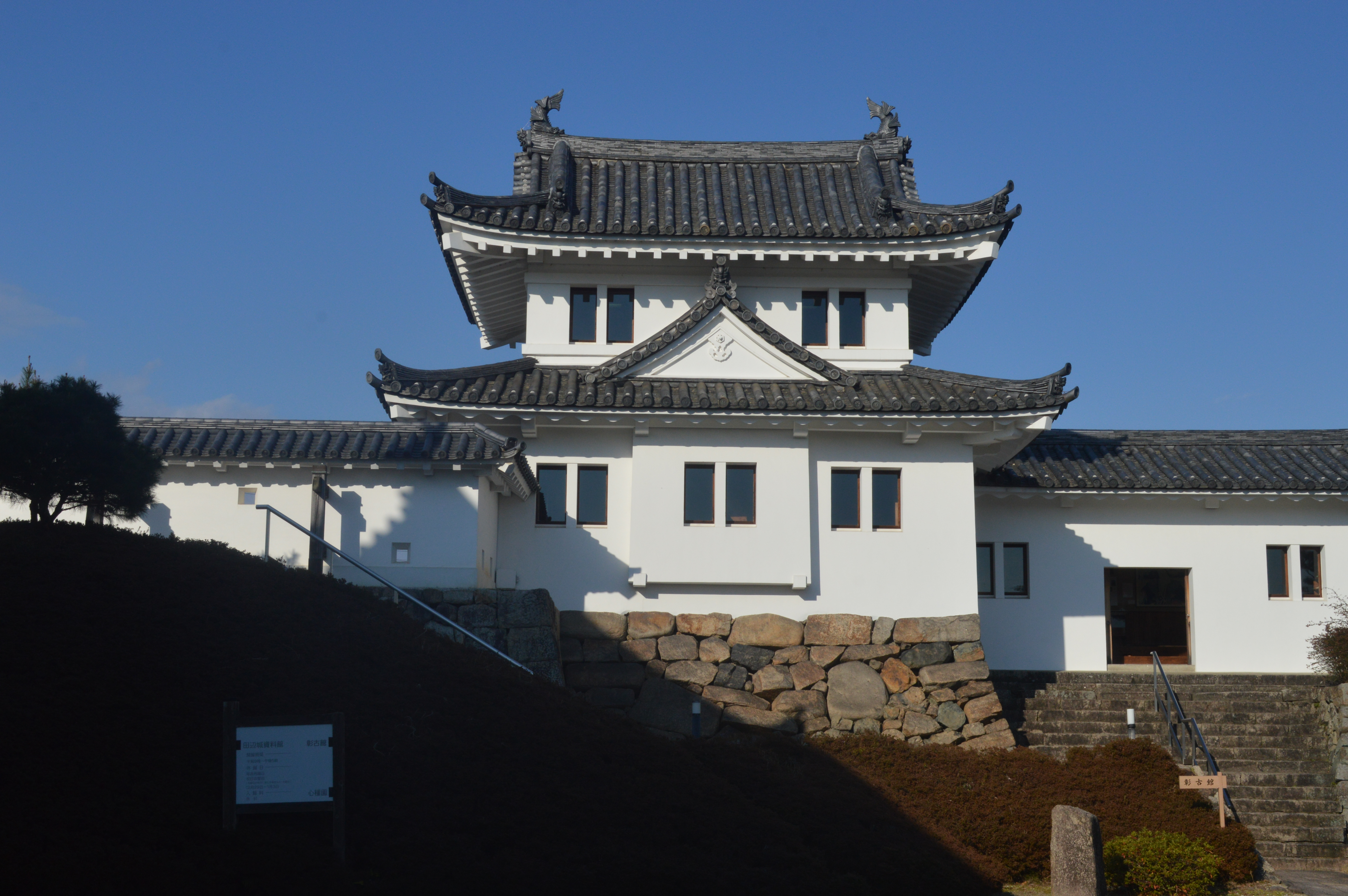 京都府舞鶴市にある田辺城址（舞鶴公園）。